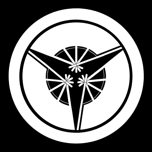 「丸に三つ扇」紋（染抜）